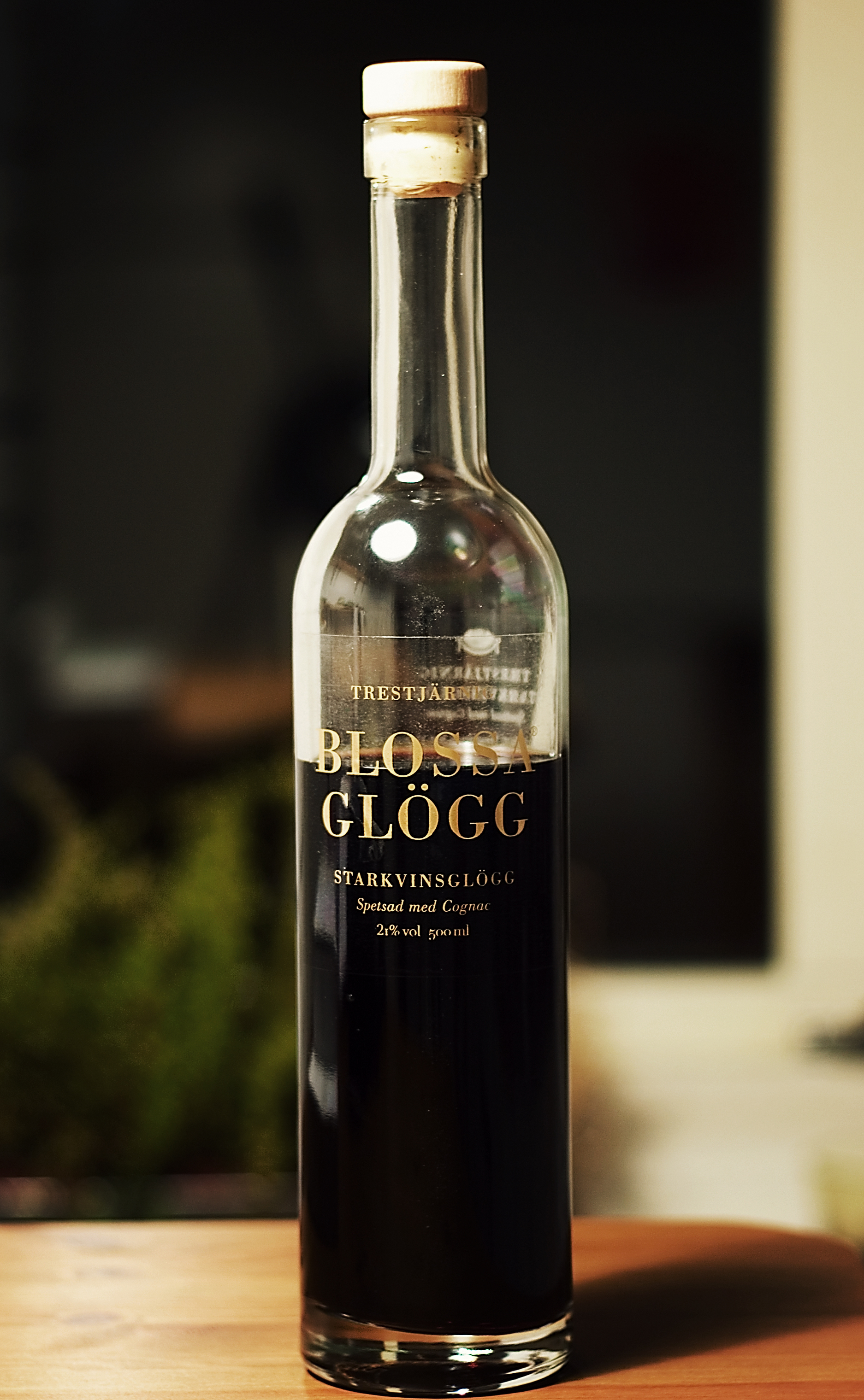 Vin chaud, marque Blossa du Systembolaget de Goteborg